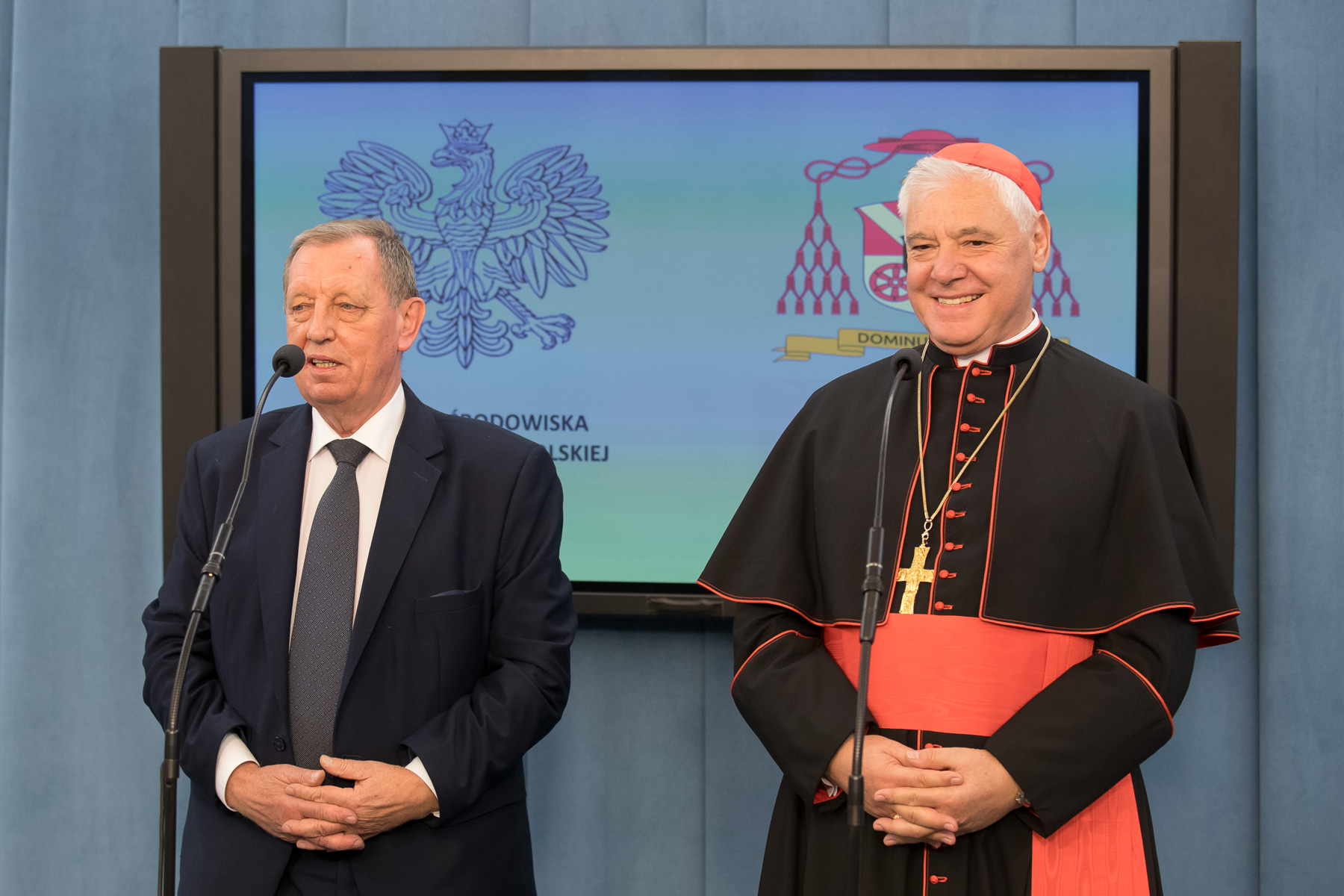 Zmarł prof. Jan Szyszko, były minister środowiska i wieloletni poseł.